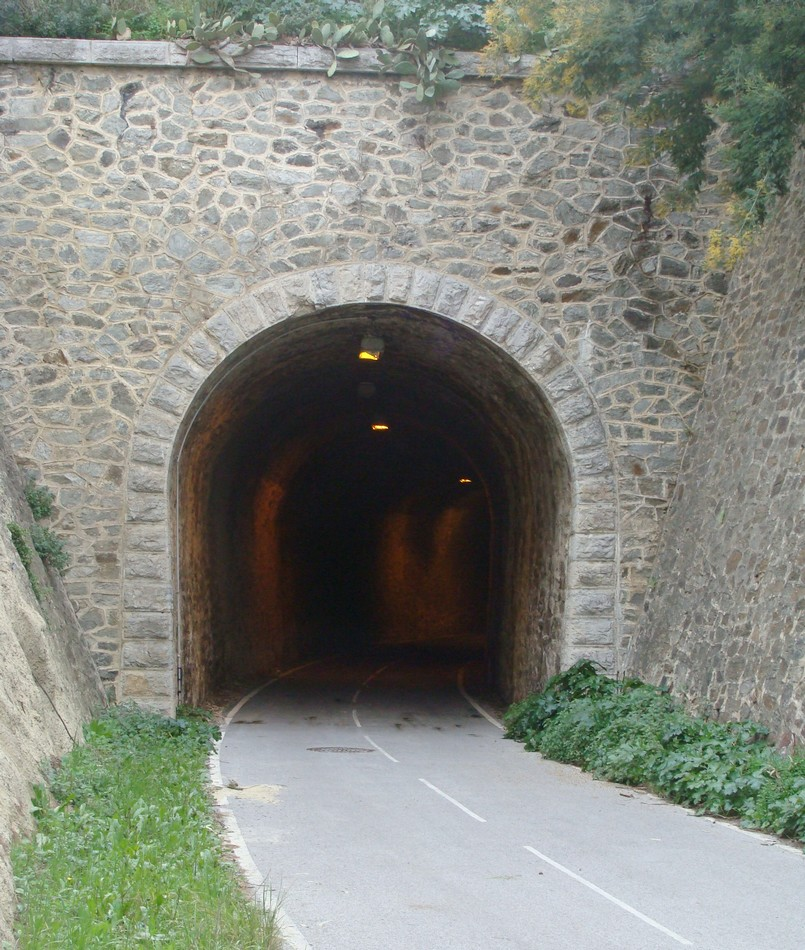 Le tunnel du Layet, de l'ancienne ligne du Littoral varois, entre le Lavandou et Cavalière (entrée est)